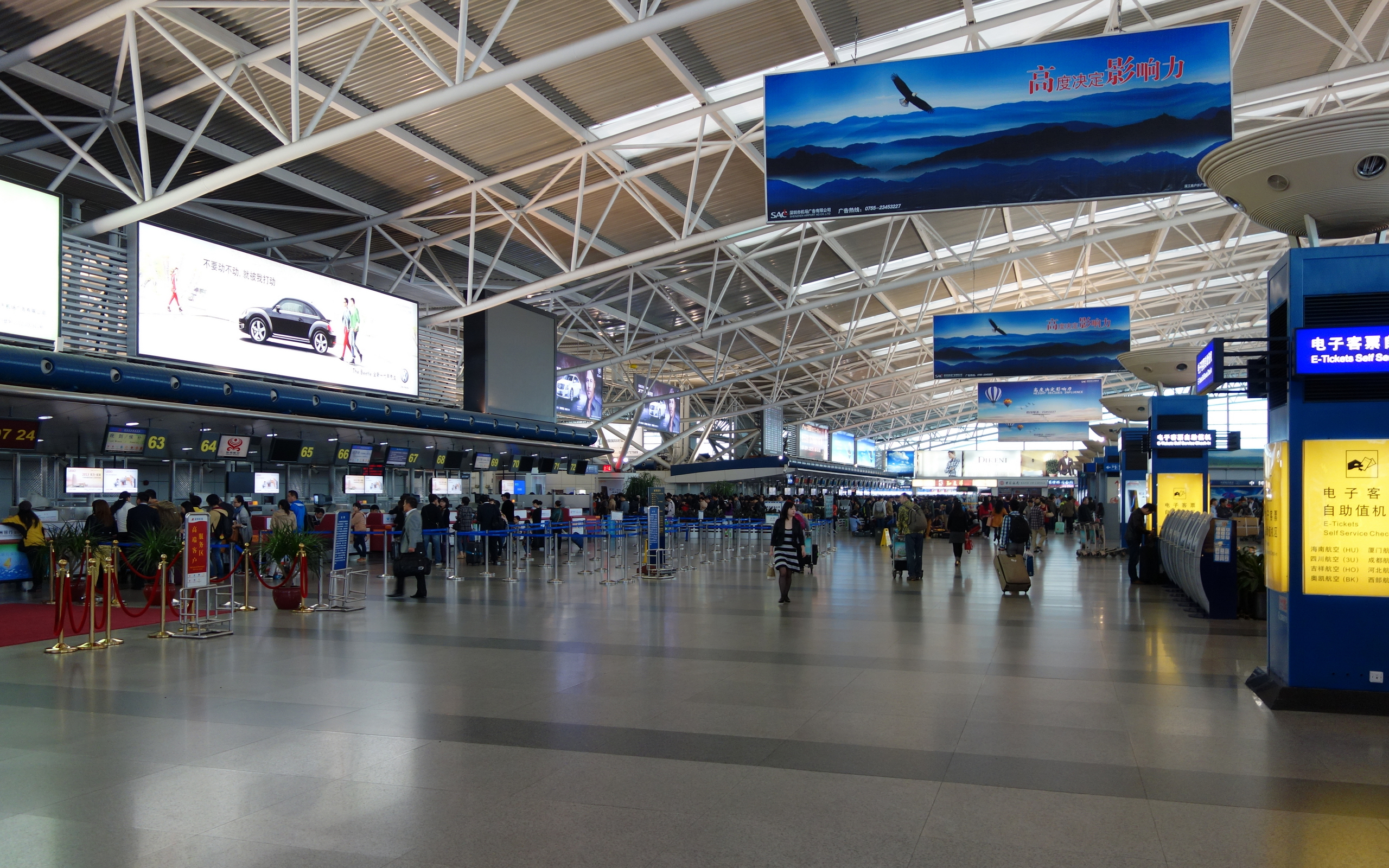 深圳宝安国际机场A候机楼出发大厅